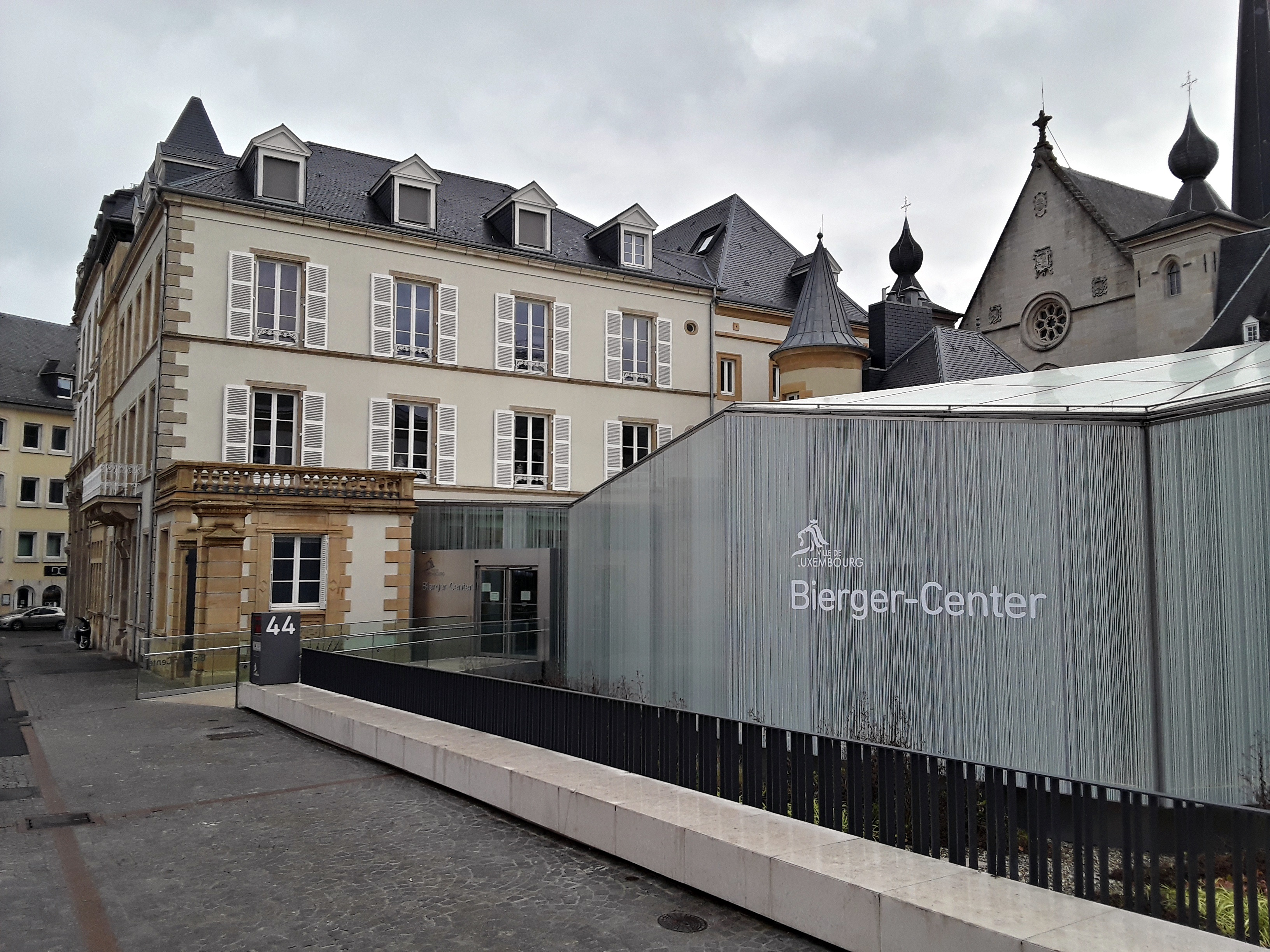 Vue sur la maison Lettelier accueillant le "Bierger-Center" de la Ville de Luxembourg. A l'avant-plan, la passerelle en verre, permettant d'accéder à l'Hôtel de ville.